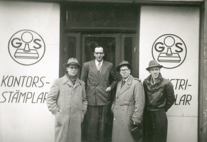 Pentti ja Eero Jousi 1950-luvulla.